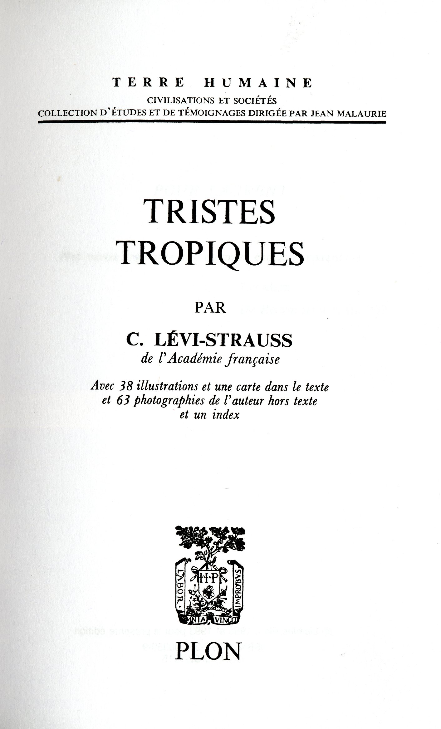 La page de titre de Tristes Tropiques de Claude Lévi-Strauss